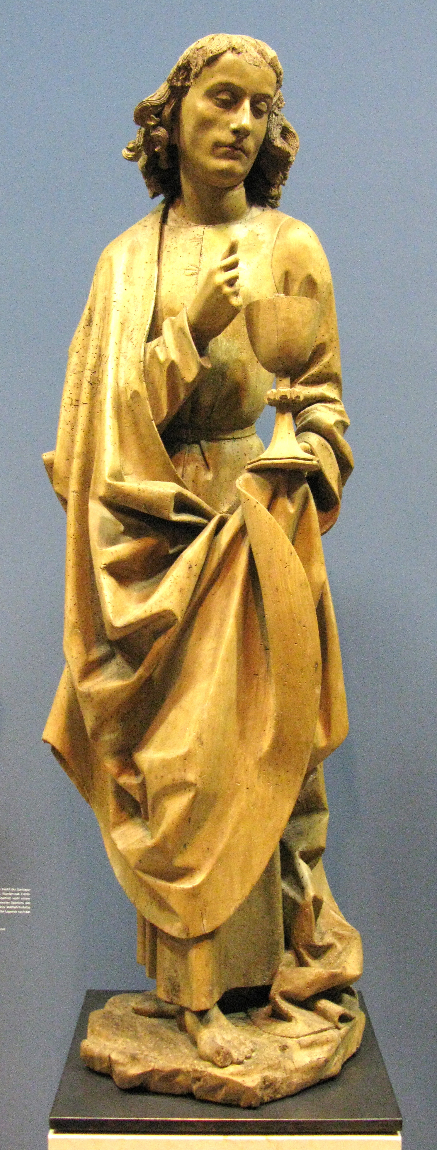 Hans Wydyz zugeschrieben: Hl. Johannes der Evanglist, Augustinermuseum Freiburg